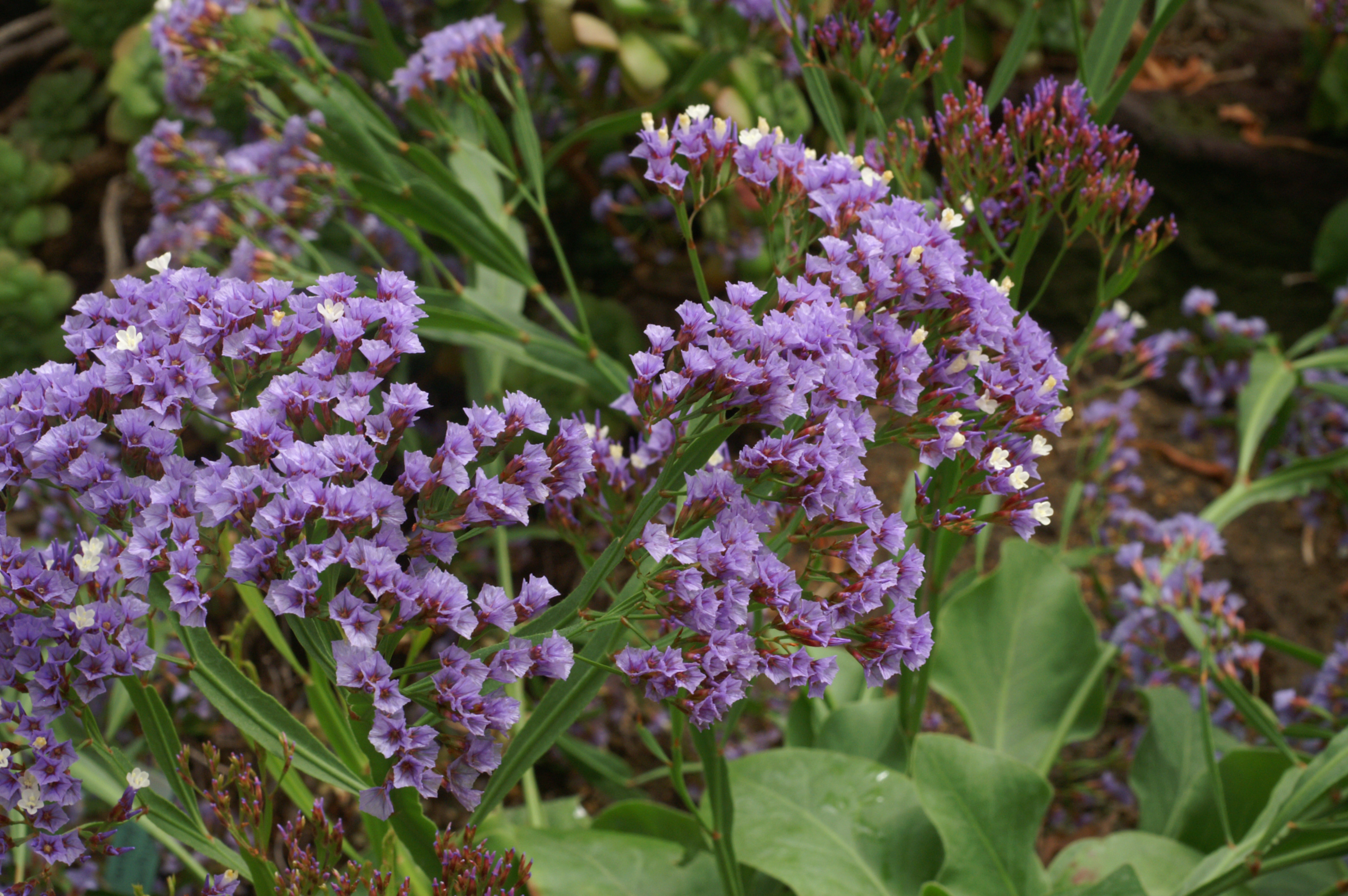 Blüten des Gomera-Strandflieders (Limonium redivivum), Botanischer Garten Berlin